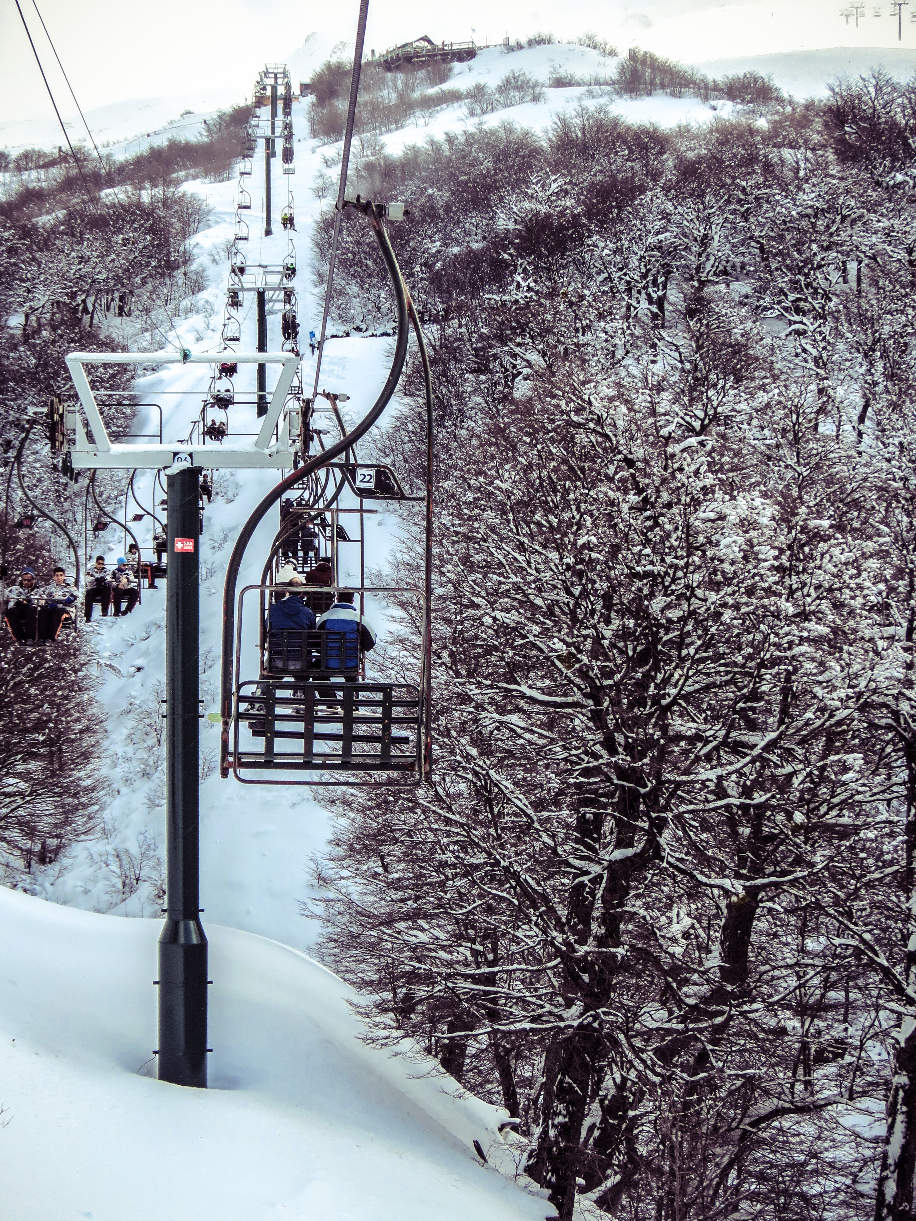 Imágenes paisajísticas